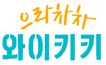 드라마 으라차차 와이키키 로고입니다.